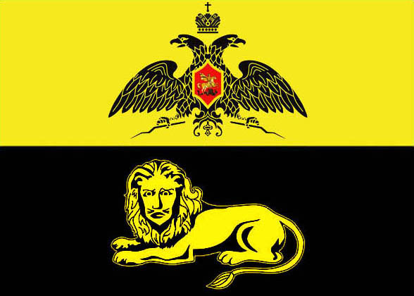 Флаг города Бендеры